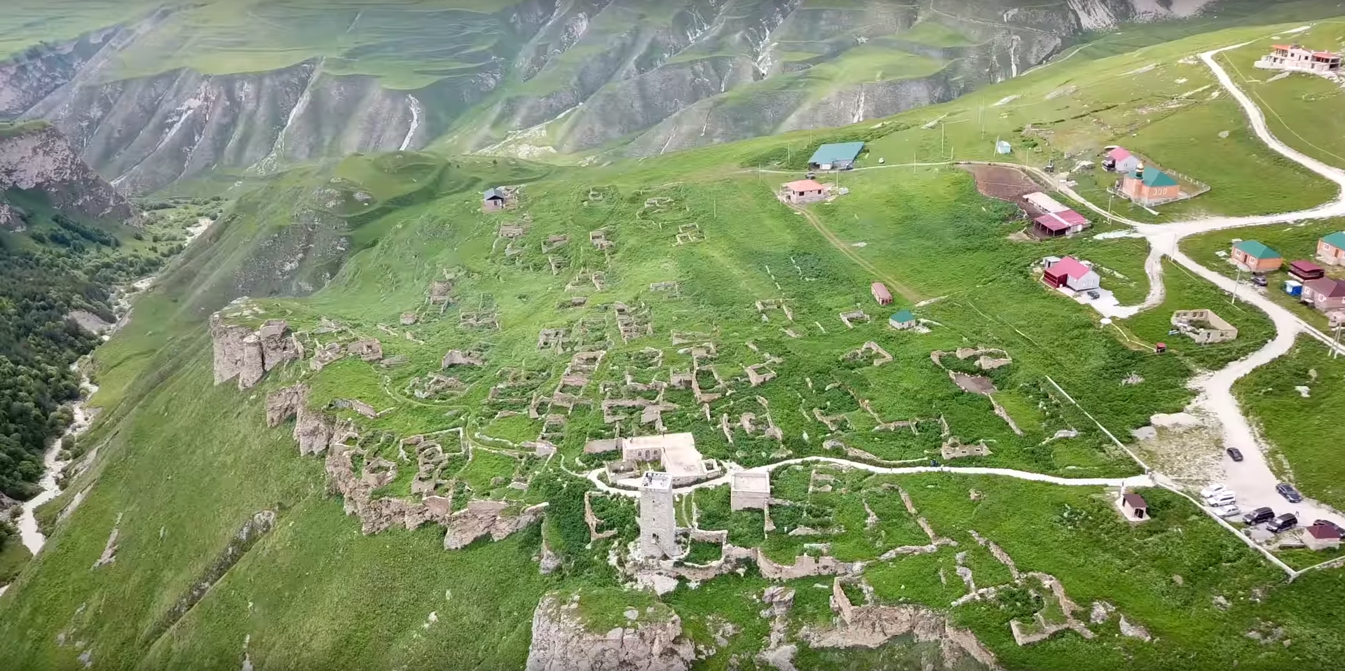 Аул Хой